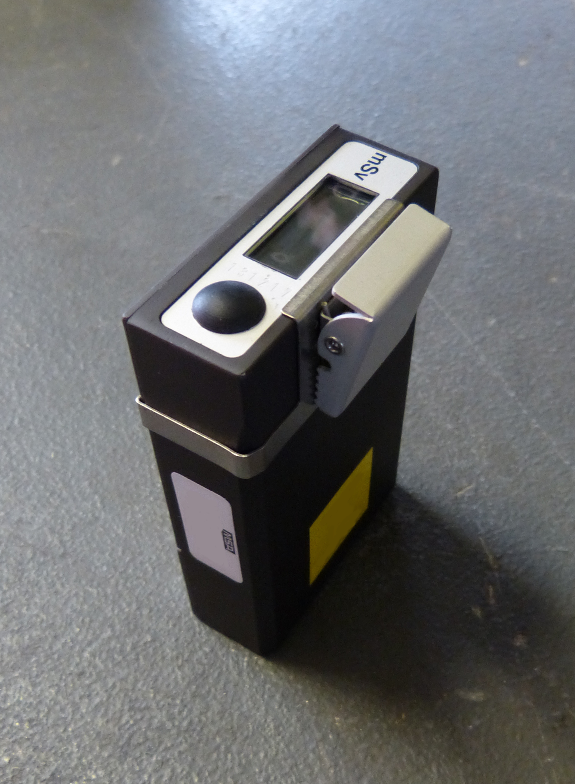 Dosiswarngerät "Aladox" der Firma Automess